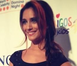 Sol Rodríguez